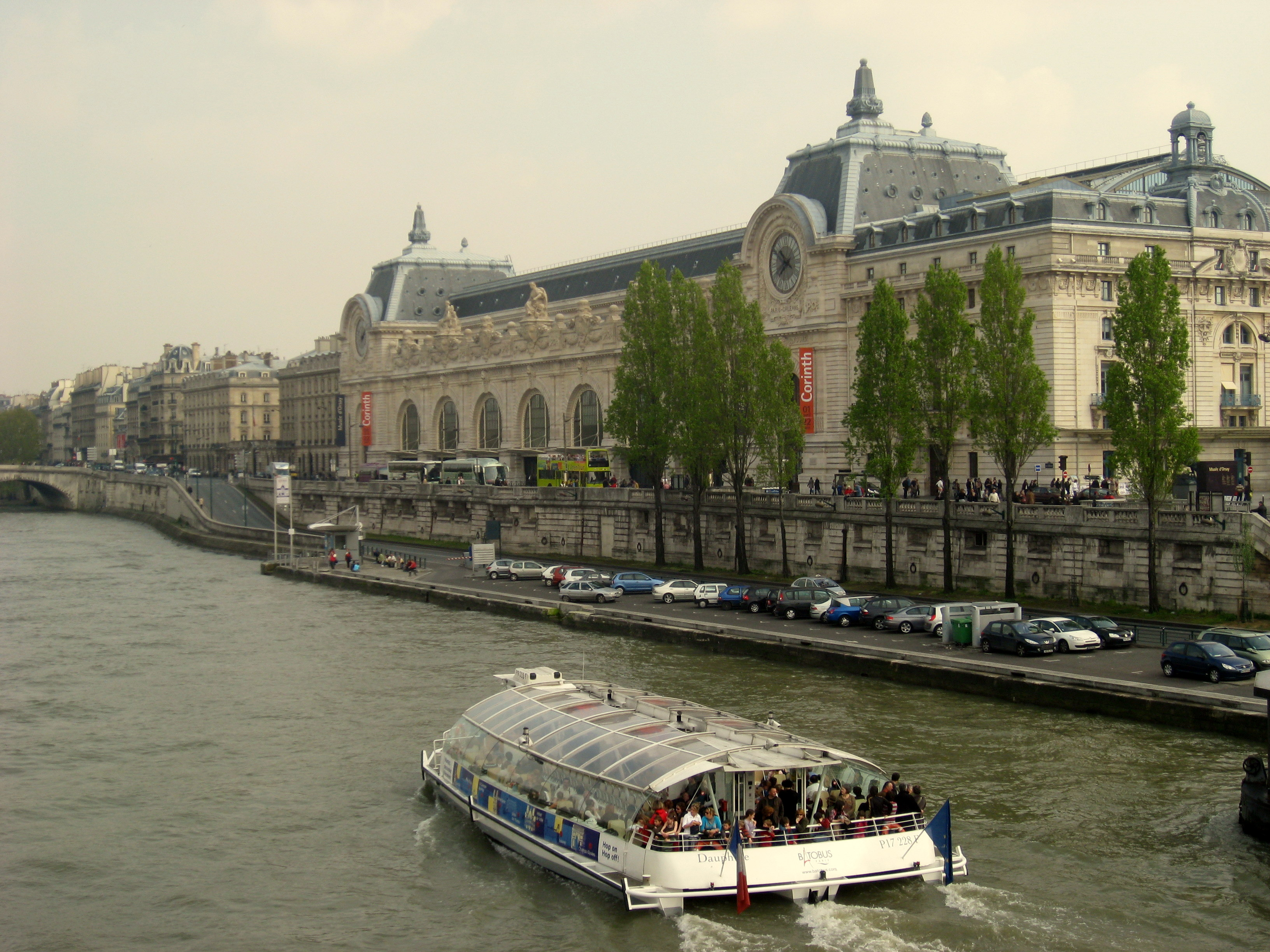 Batobus Dauphine devant le Musée Orsay